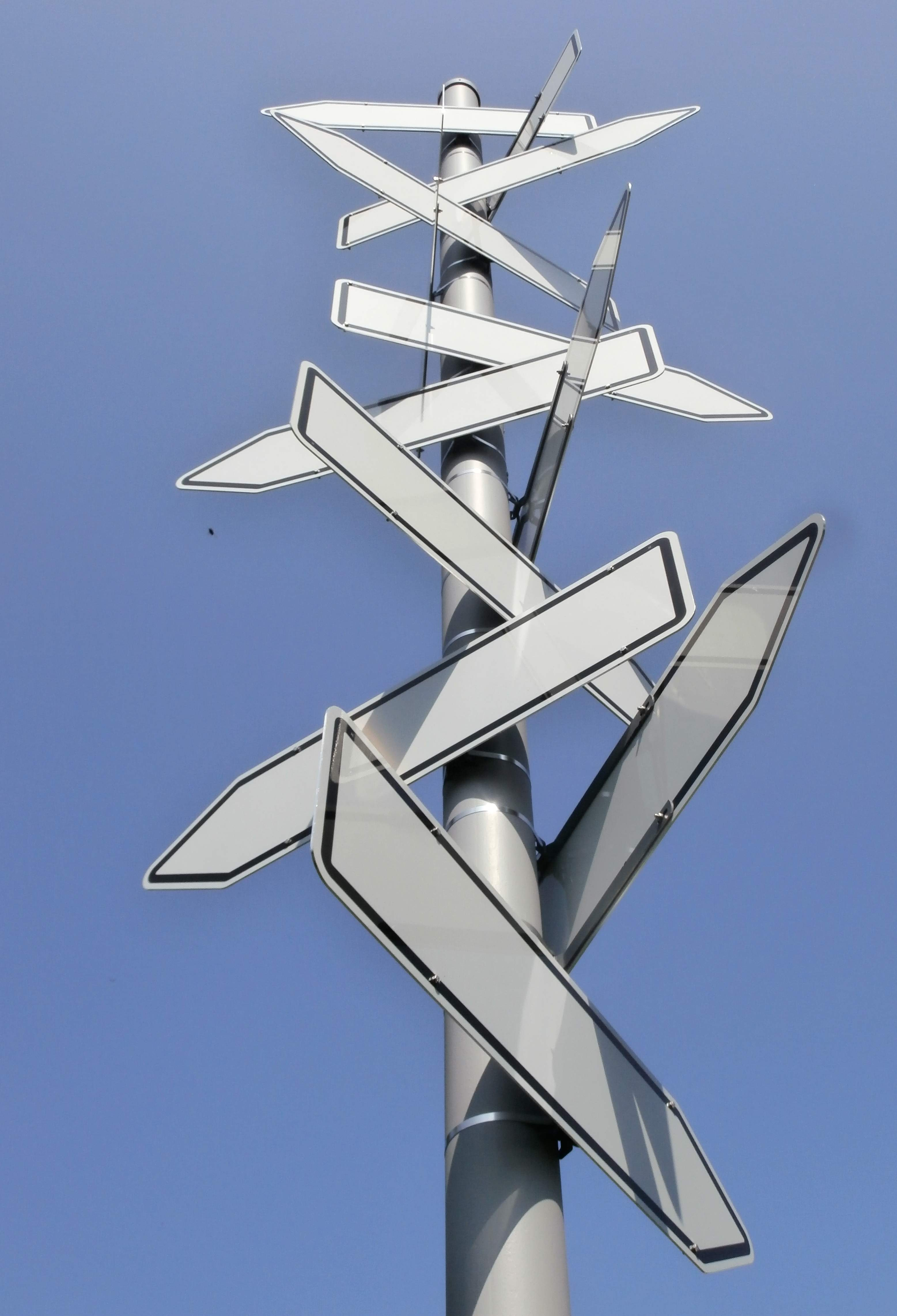 Mahnmal_zum_Durchgangslager_Bietigheim: symbolisiert die "Verschickung" in alle Richtungen